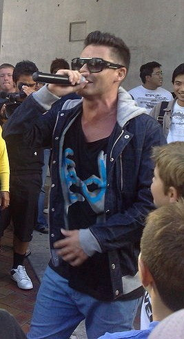 Dane Rumble.